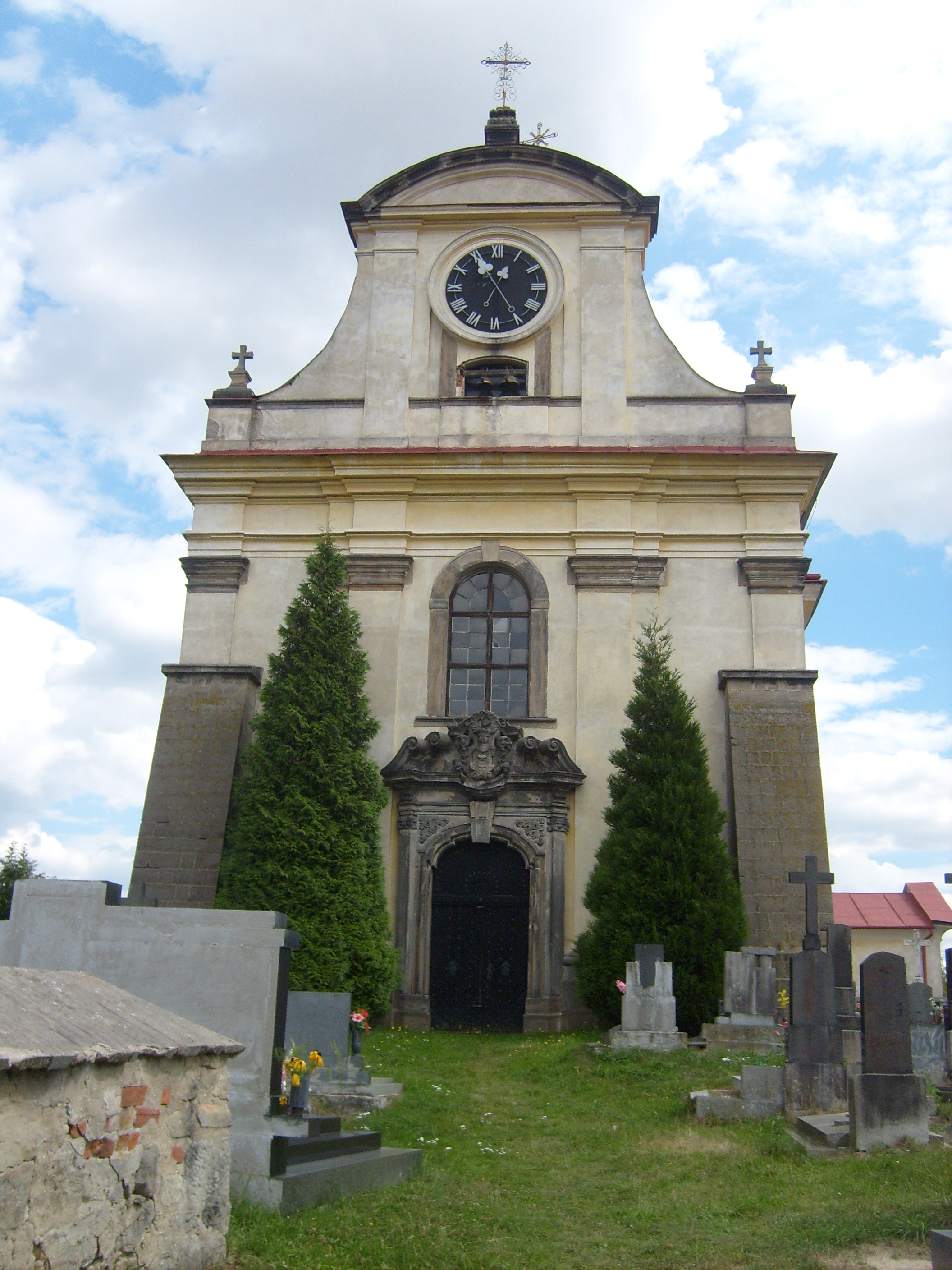 Kostel v Oseku, okres Jičín